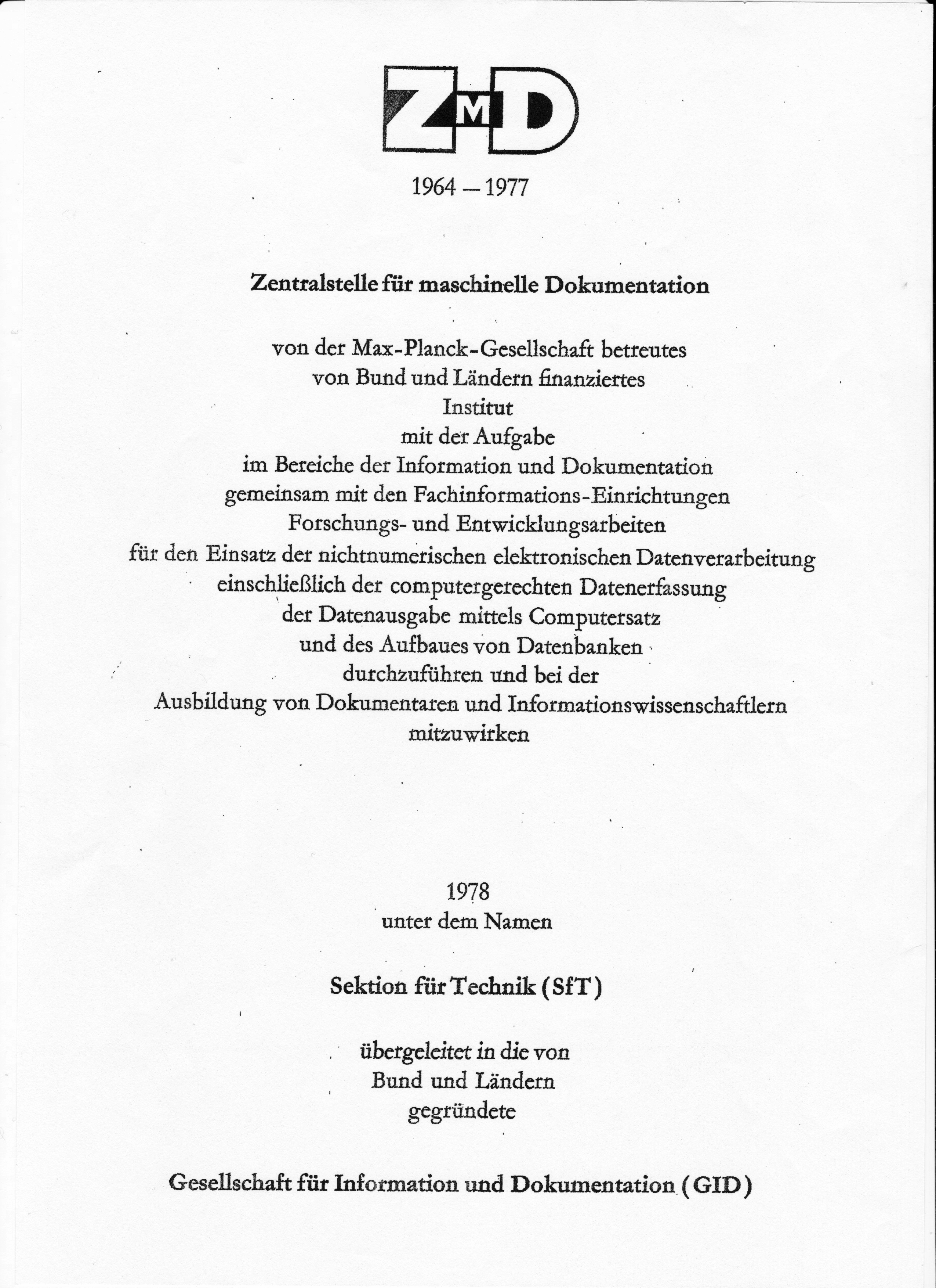 Zentralstelle für maschinelle Dokumentation (ZMD) – Eine historische Institutsbeschreibung mit einem schlichten Logo